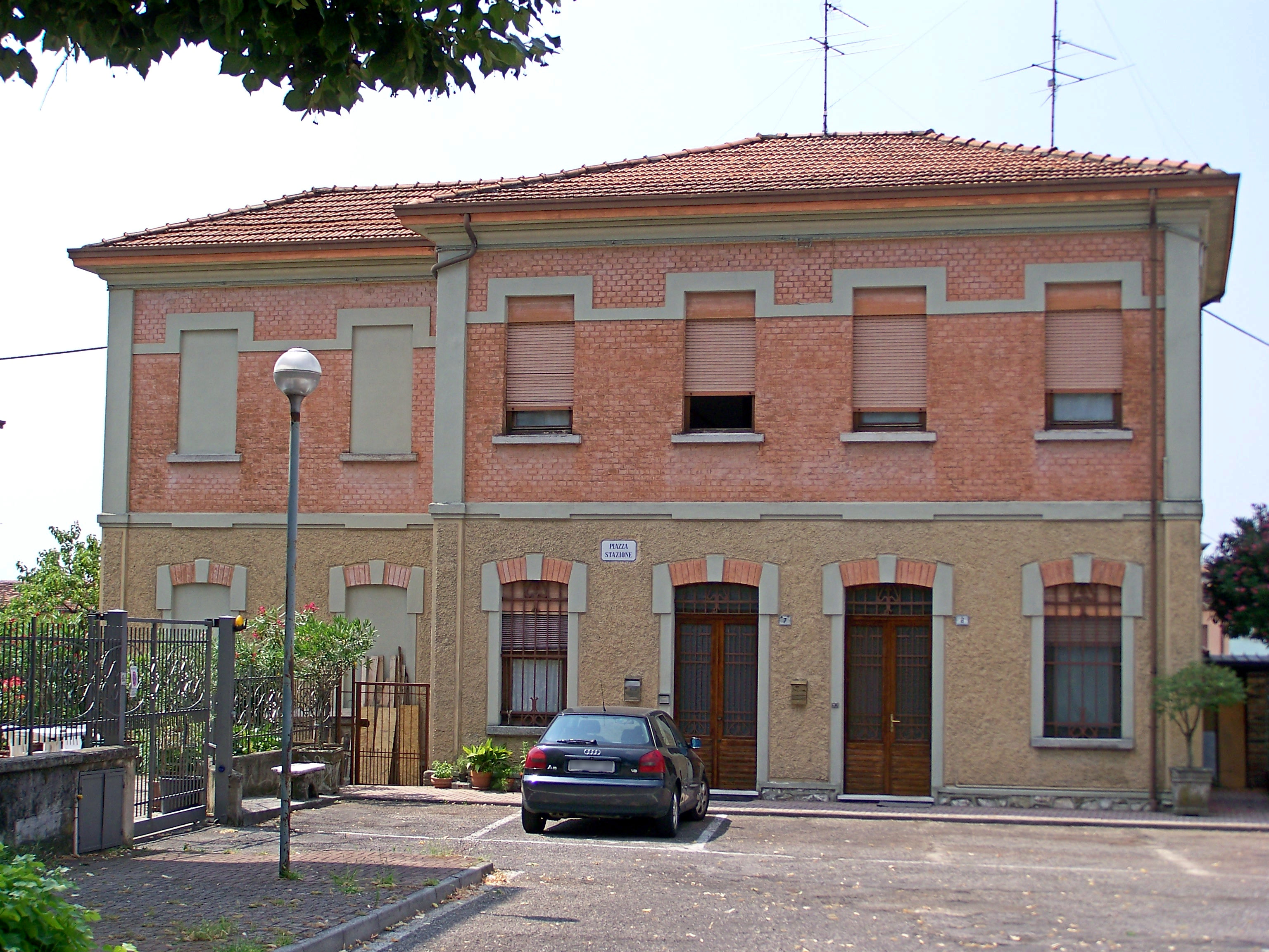 Lato paese della stazione tranviaria di Castiglione delle Stiviere, posta sulla tranvia Brescia-Mantova-Ostiglia e capotronco della linea per Desenzano sul Lago